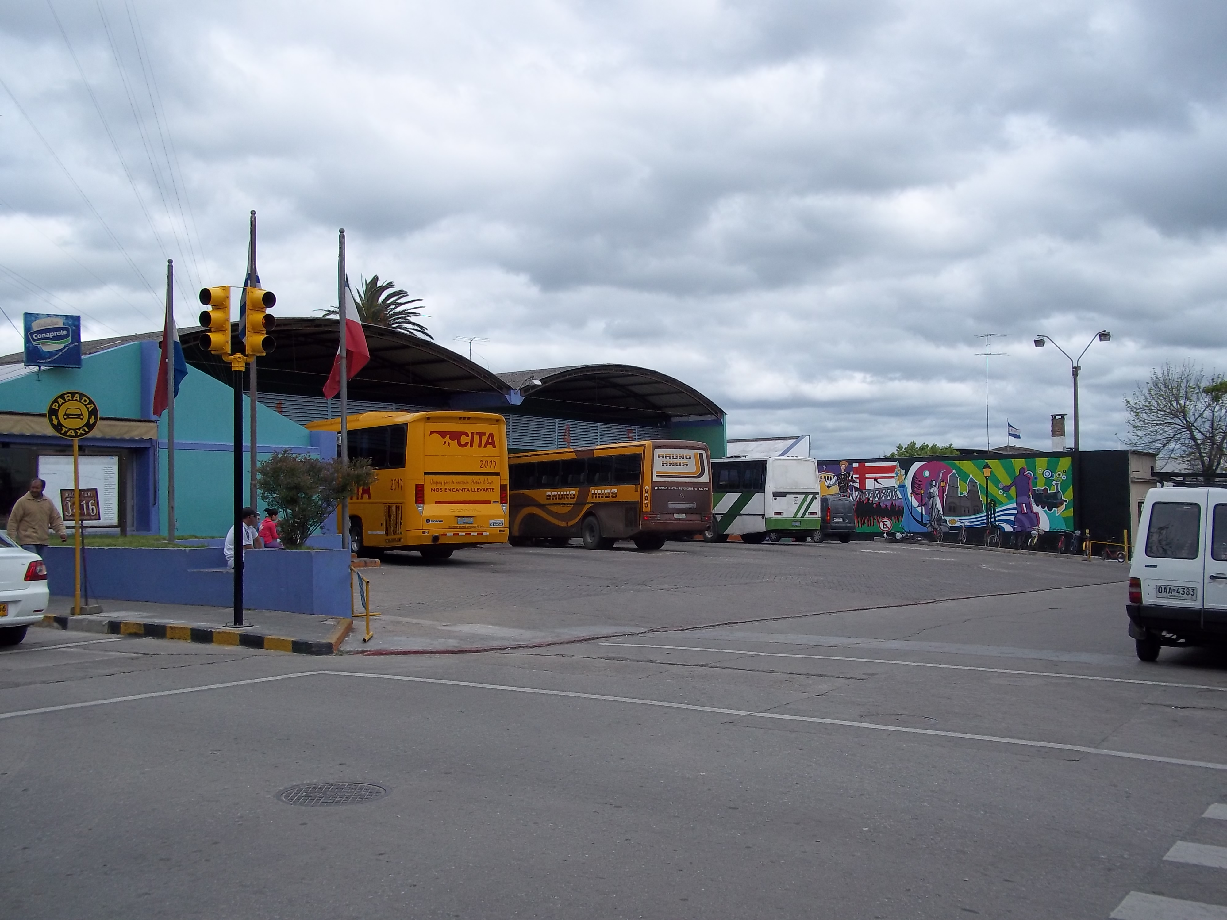 Terminal de ómnibus en la ciudad de Florida, Uruguay.